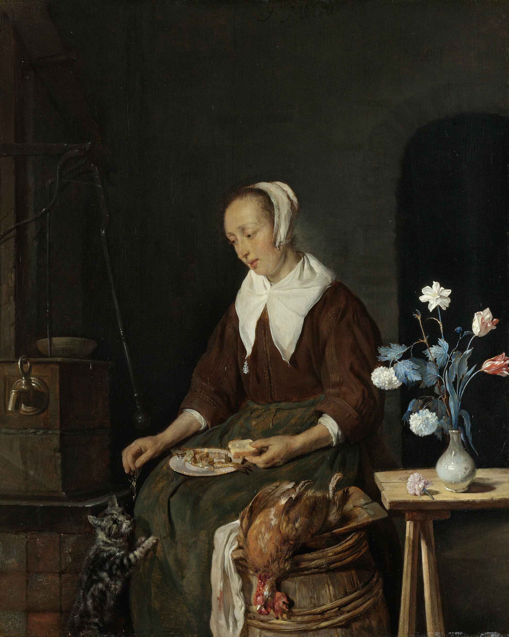 Een zittende vrouw eet een haring met brood, een tegen haar opspringende kat krijgt de graat van de vis. Voorstelling bekend als 'Het ontbijt van de kat'. Links een waterpomp, op de voorgrond een vat waarop een dode kip ligt, rechts een vaas met bloemen op een tafeltje.; Gabriël Metsu (1629–1667), olieverf op paneel, ca. 1661–1664